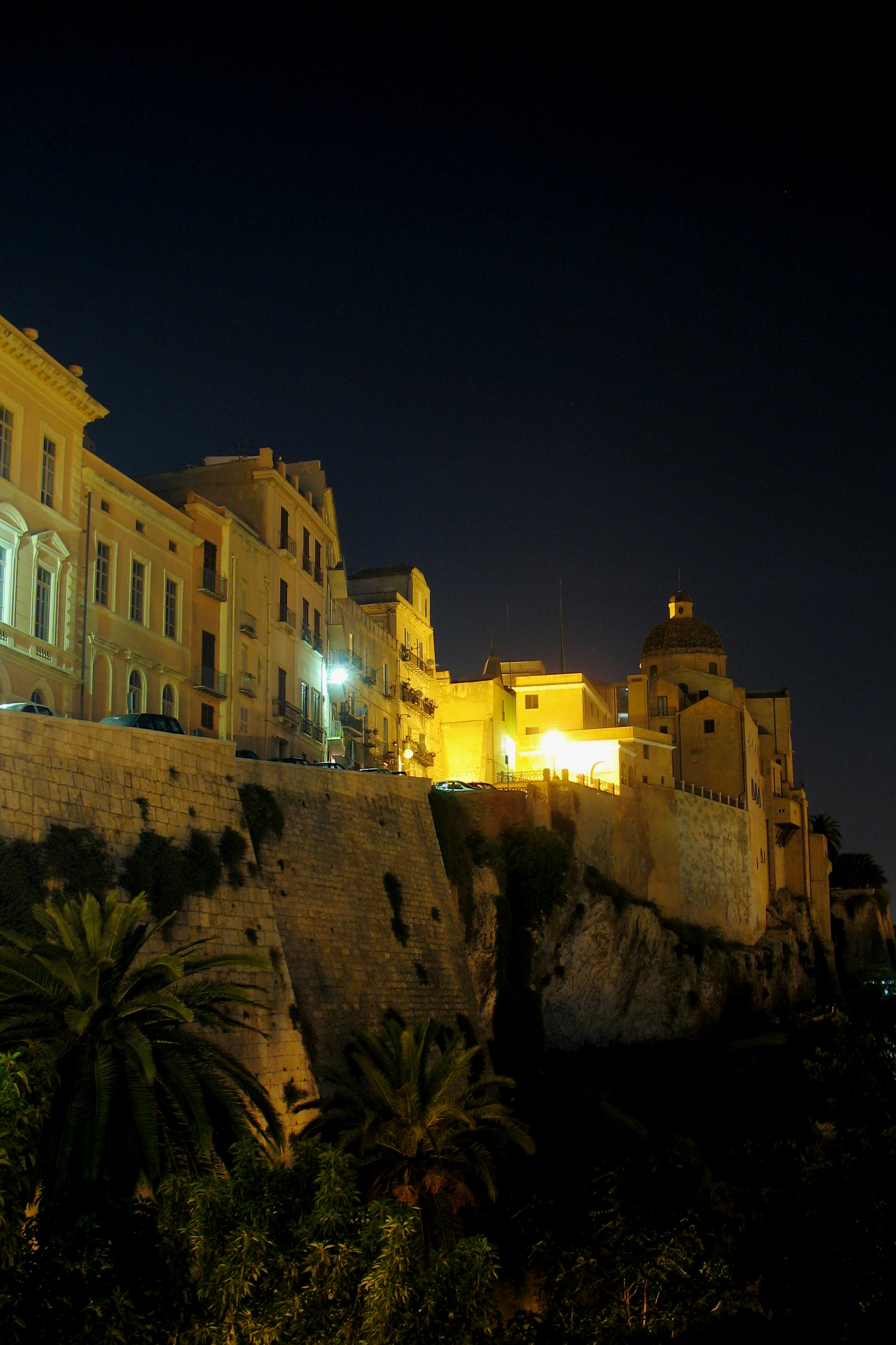 Cagliari, Sardegna, Italia